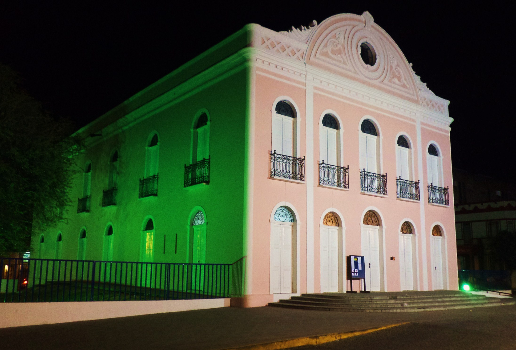 A Cidade de Sobral, Ceará; Theatro São João